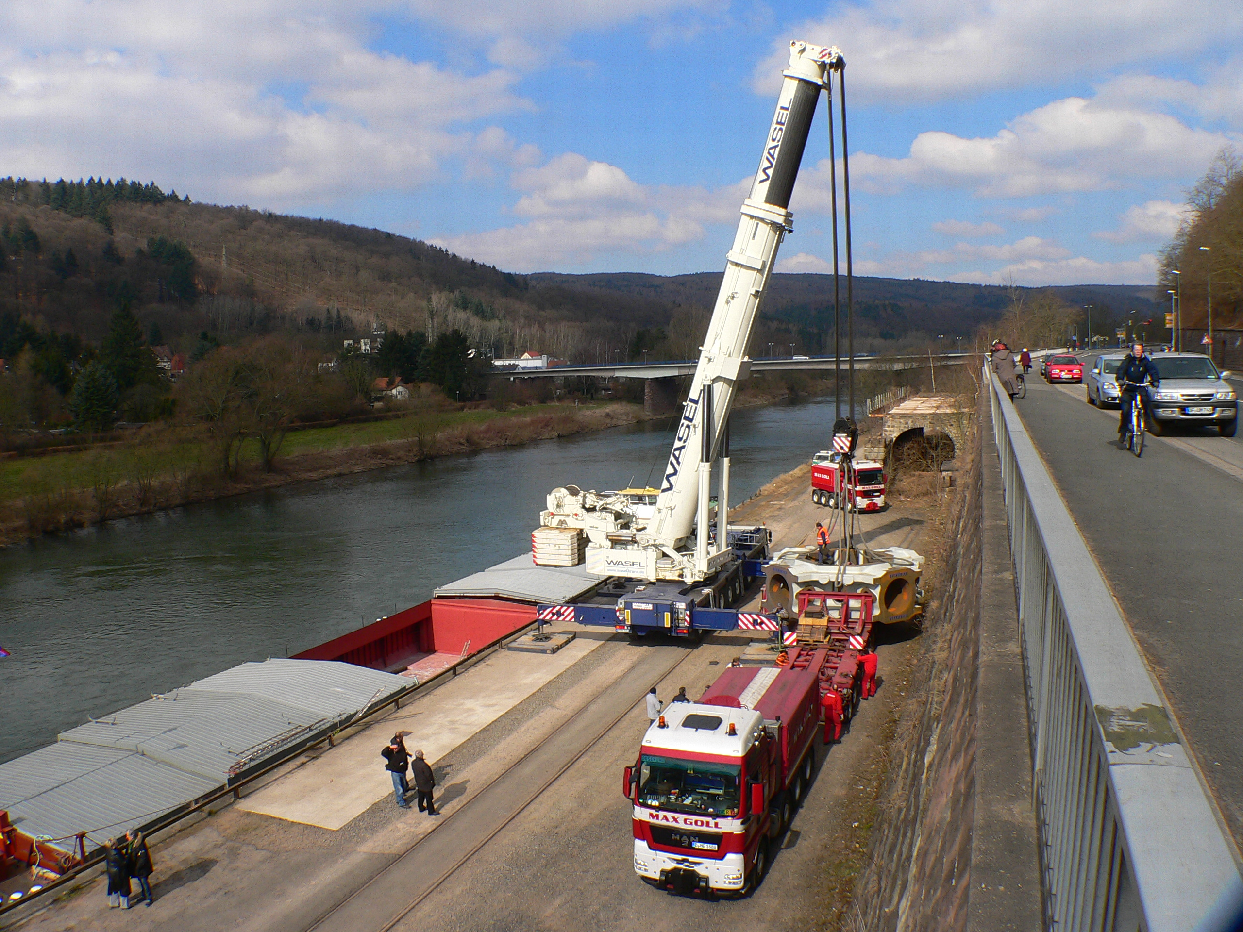 Weserumschlagstelle in Hann. Münden, Verladung eines Eisengussteils